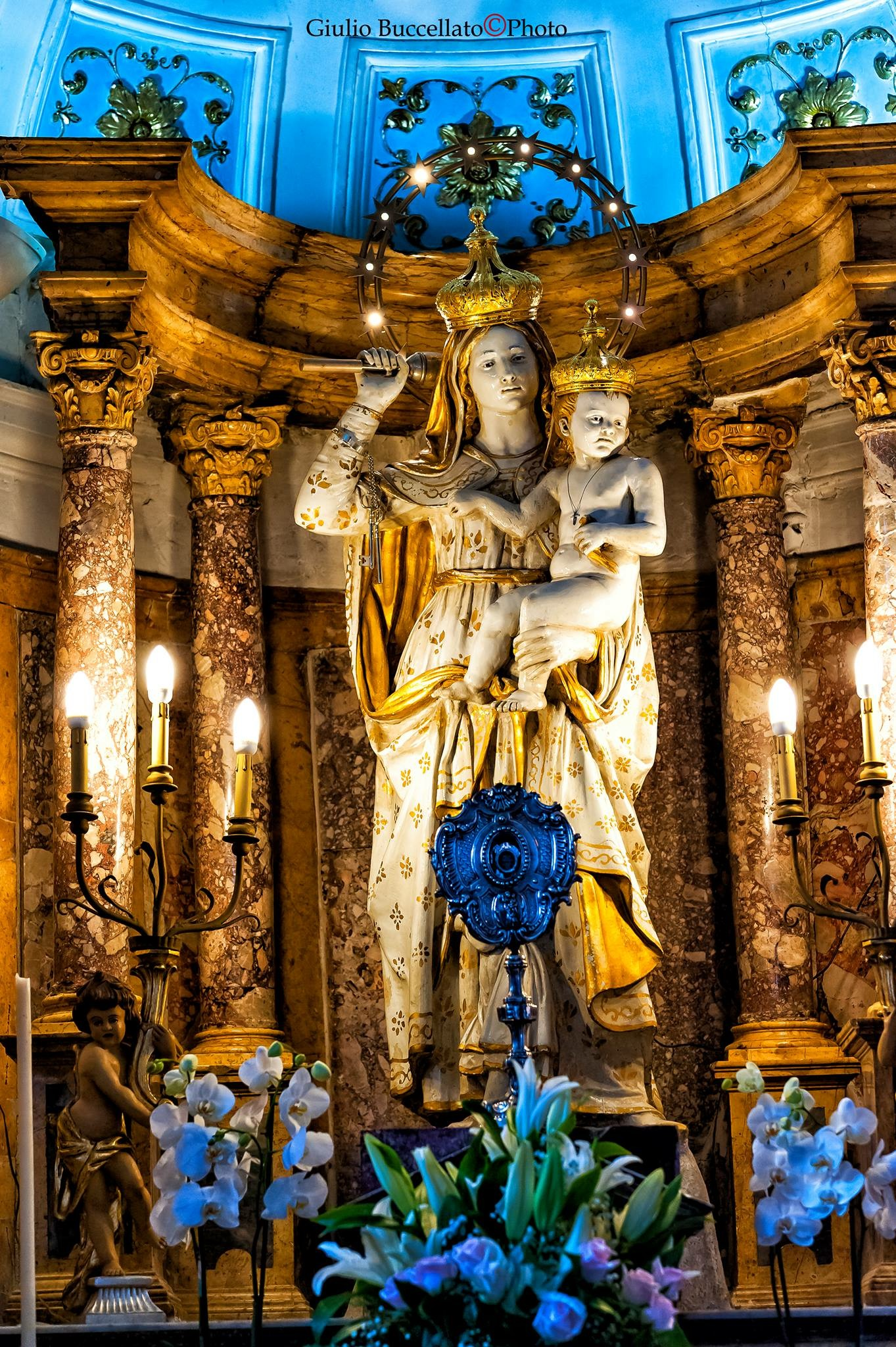 Simulacro della madoona del soccorso